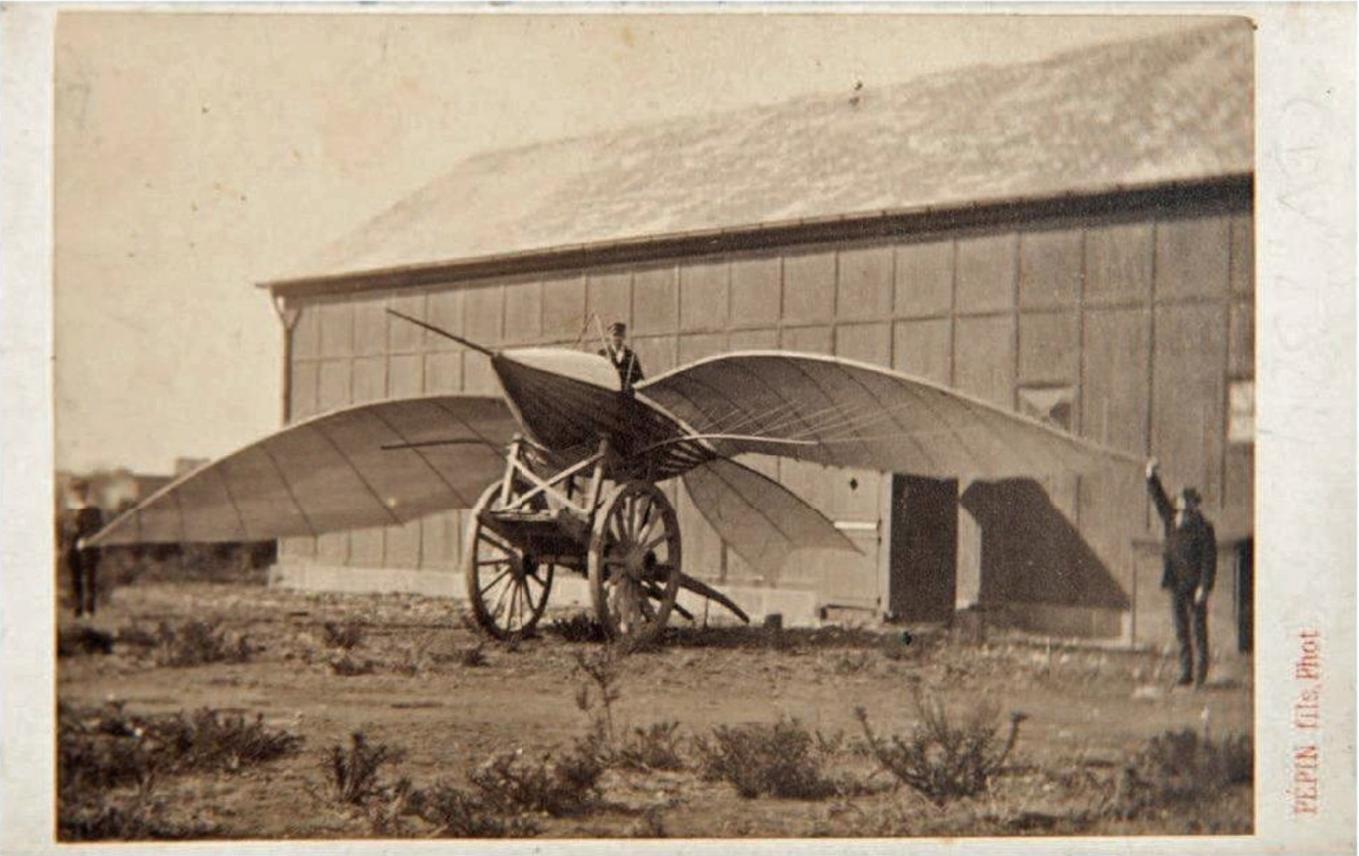 Das Gleitflugzeug Albatros II von Jean Marie Le Bris im Jahr 1868 in Brest. Die erste Photographie, die ein Flugzeug in der Totalen zeigt. Kennzeichnung auf dem Bild PÉPIN fils, Phot. Einige Quellen ordnen die Aufnahme Nadar zu.